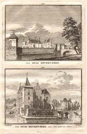 Deze afbeelding is afkomstig uit “Het verheerlykt Nederland of Kabinet van Hedendaagsche Gezigten”, dat in de jaren 1745 tot 1774 werd uitgegeven door Isaak Tirion in Amsterdam. Het zijn originele kopergravures van Hendrik Spilman (1721-1784), gemaakt naar tekeningen van Jan de Beijer uit 1745. De afbeelding is genomen vanaf de originele kopergravures, in eigen (particulier) bezit. --CvN 24 okt 2004 23:39 (CEST)